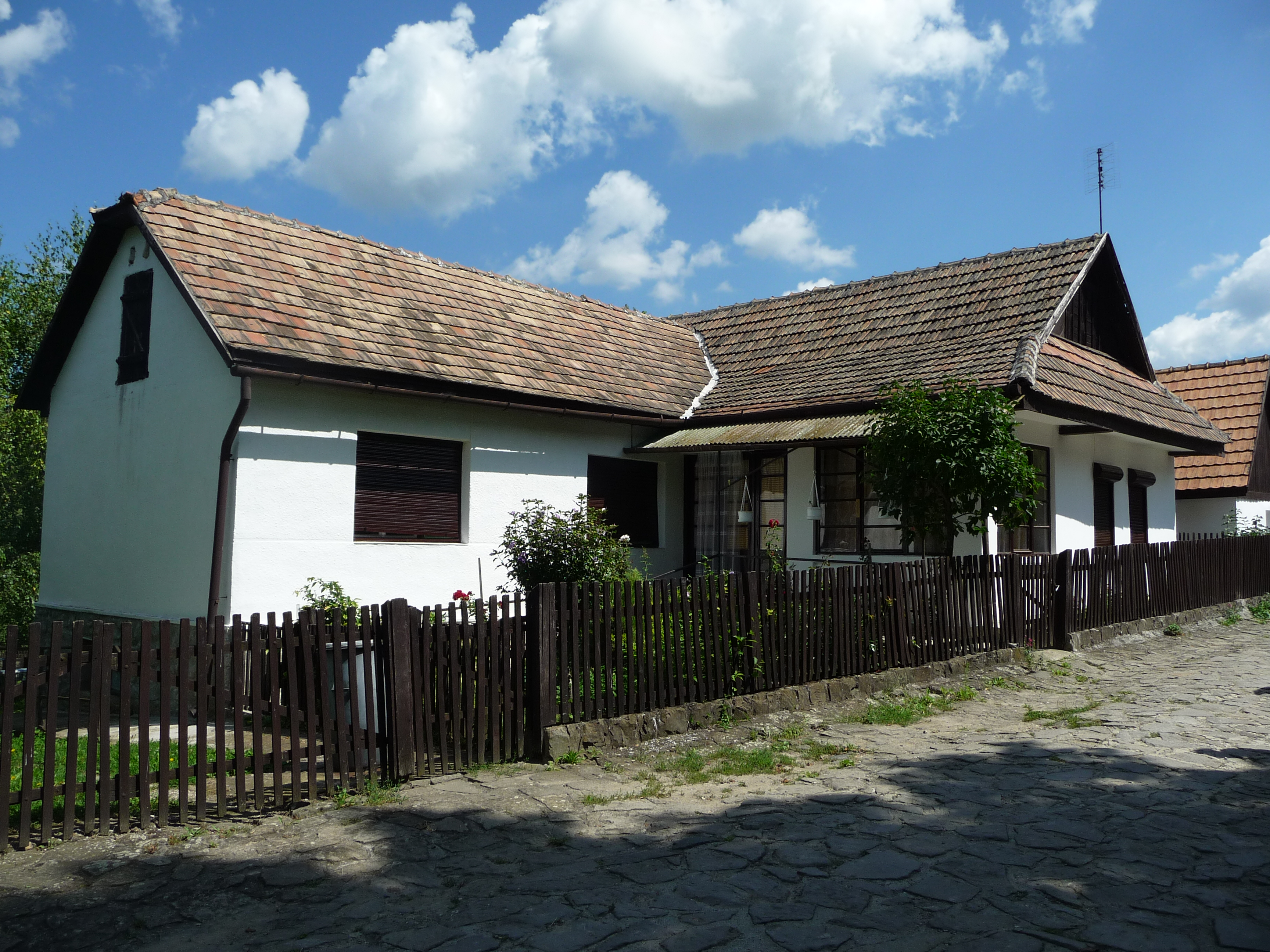 Hollókő, Kossuth u. 107.